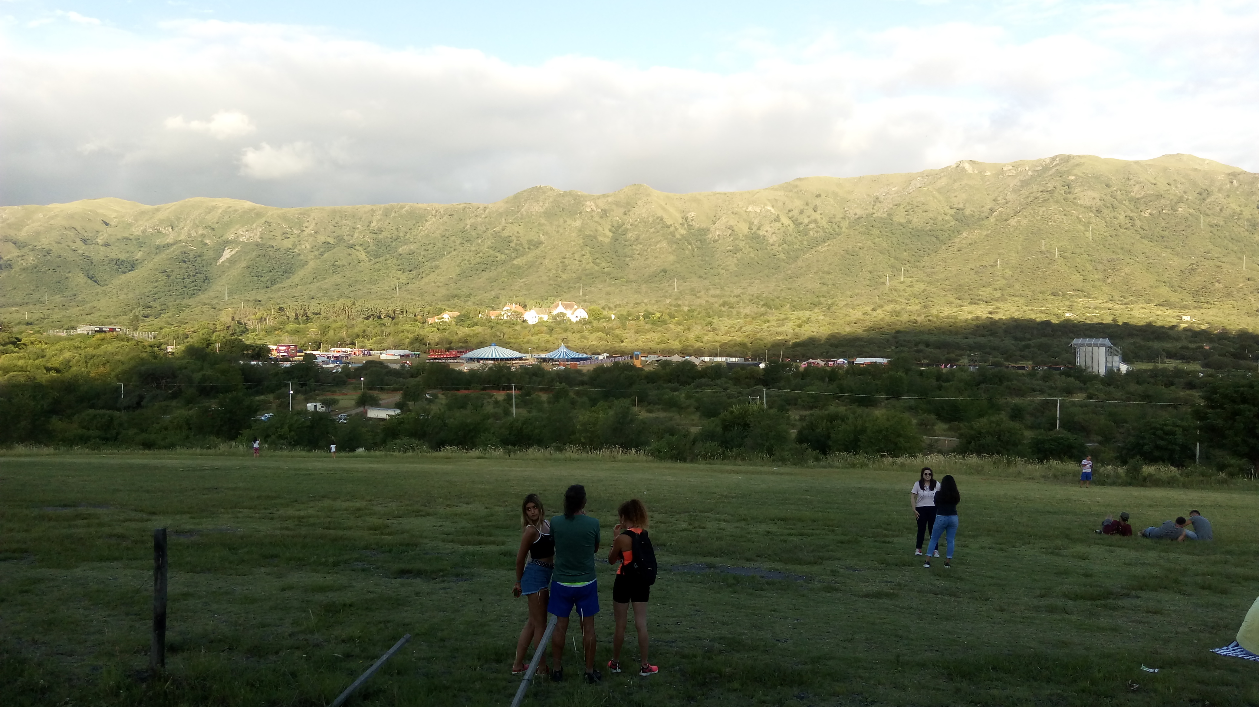 Infraestructura montada para el Cosquín Rock 2020